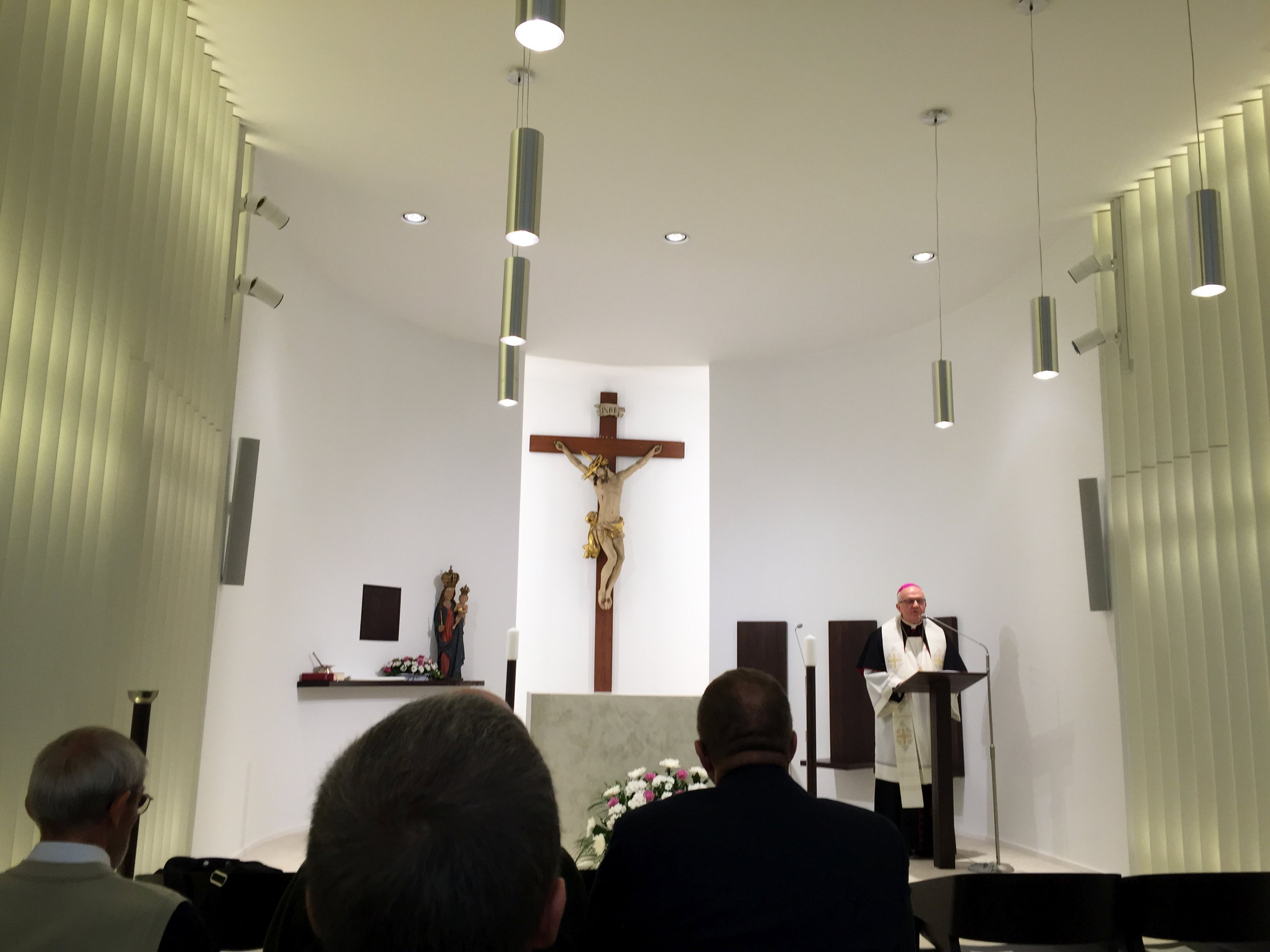 Požehnání kaple (oratoria) Nejsvětějšího Srdce Páně v Diecézním domě kard. Trochty (Komenského 4, Litoměřice) dne 13.10.2015 biskupem Janem Baxantem